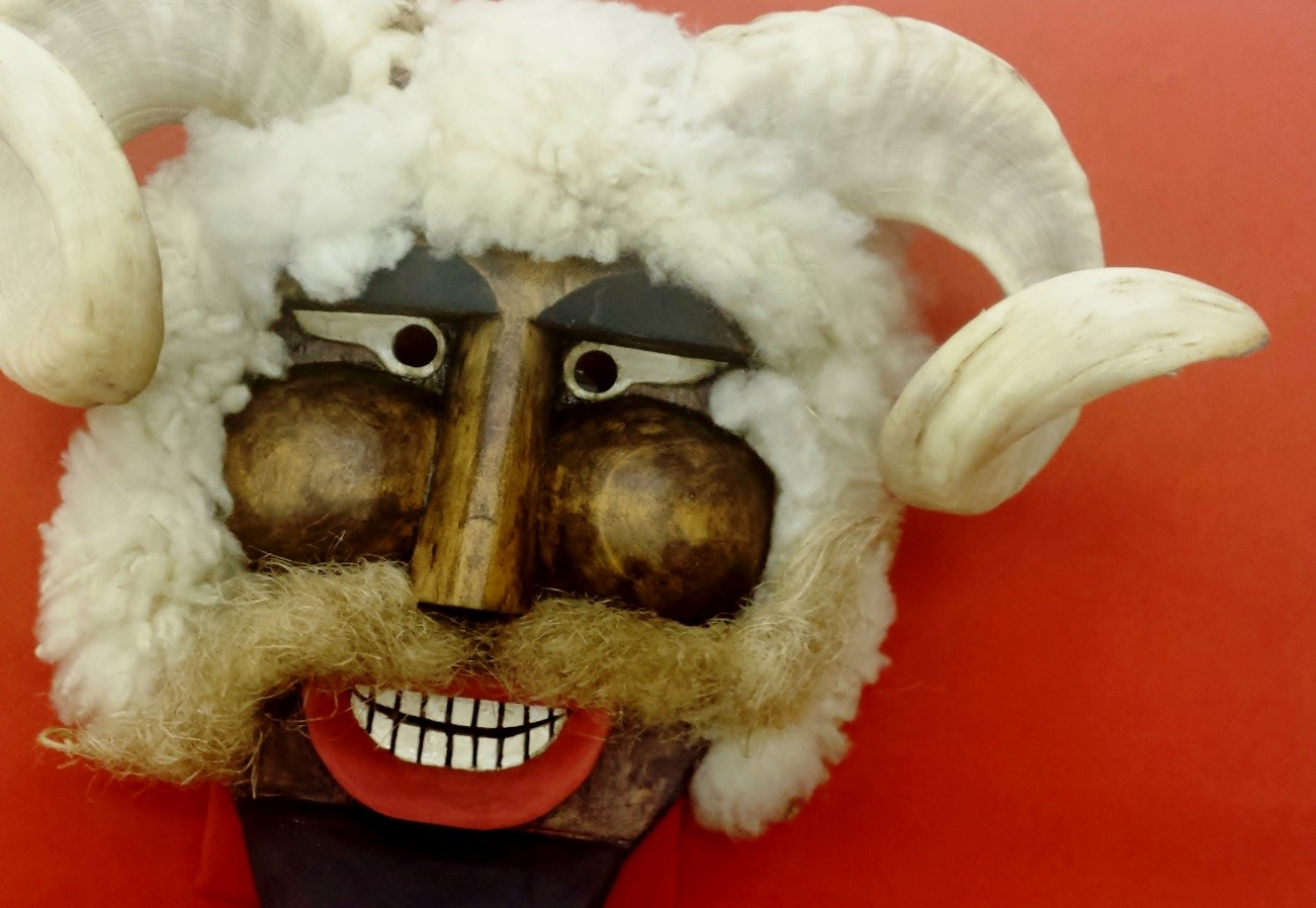 Madeira. Mohács, Hungria.1985. Doação Andras Bascah. Acervo Museu da Imigração de São Paulo. Essa é uma máscara Busó e veio de uma cidade da Hungria chamada Mohács, que atrai anualmente muitos visitantes no período do Carnaval. O motivo é o Busójárá, desfile de Busós, evento em que mascarados desfilam, dançam, brincam e fazem muito barulho pelas ruas da cidade, vestidos com assustadoras máscaras de madeira. Além da máscara, faz parte do traje Busó grandes casacos de lã de carneiro, calças largas brancas e botas, além de sinos e chocalhos de madeira. Cada Busó tem uma aparência única. As máscaras são artesanais e tradicionalmente feitas em madeira de salgueiro e pintadas com sangue de animais. Elas possuem um olho assustador, dentes à mostra, sobrancelhas franzidas, chifres de carneiro e cabelos de lã. As mulheres vestem roupas tradicionais Šokci, composta de saia, avental, xale e uma máscara com véu de renda cobrindo o rosto. A celebração do Carnaval em Mohács dura seis dias e termina com um ritual simbólico chamado de o “Enterro do Farsang”, em que um caixão é queimado na Praça Széchenyi para espantar o inverno e dar boas vindas à chegada da primavera.